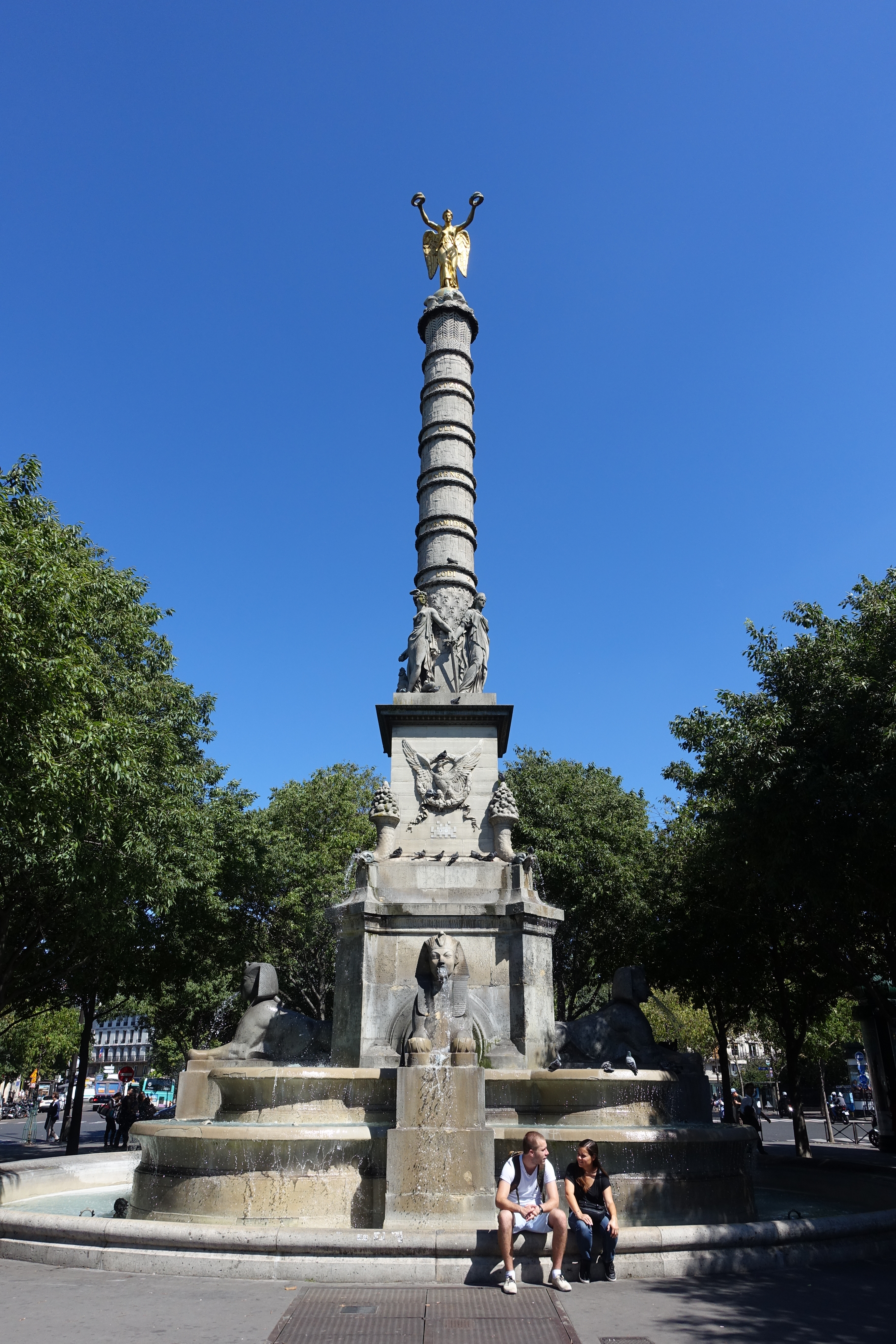 Paris